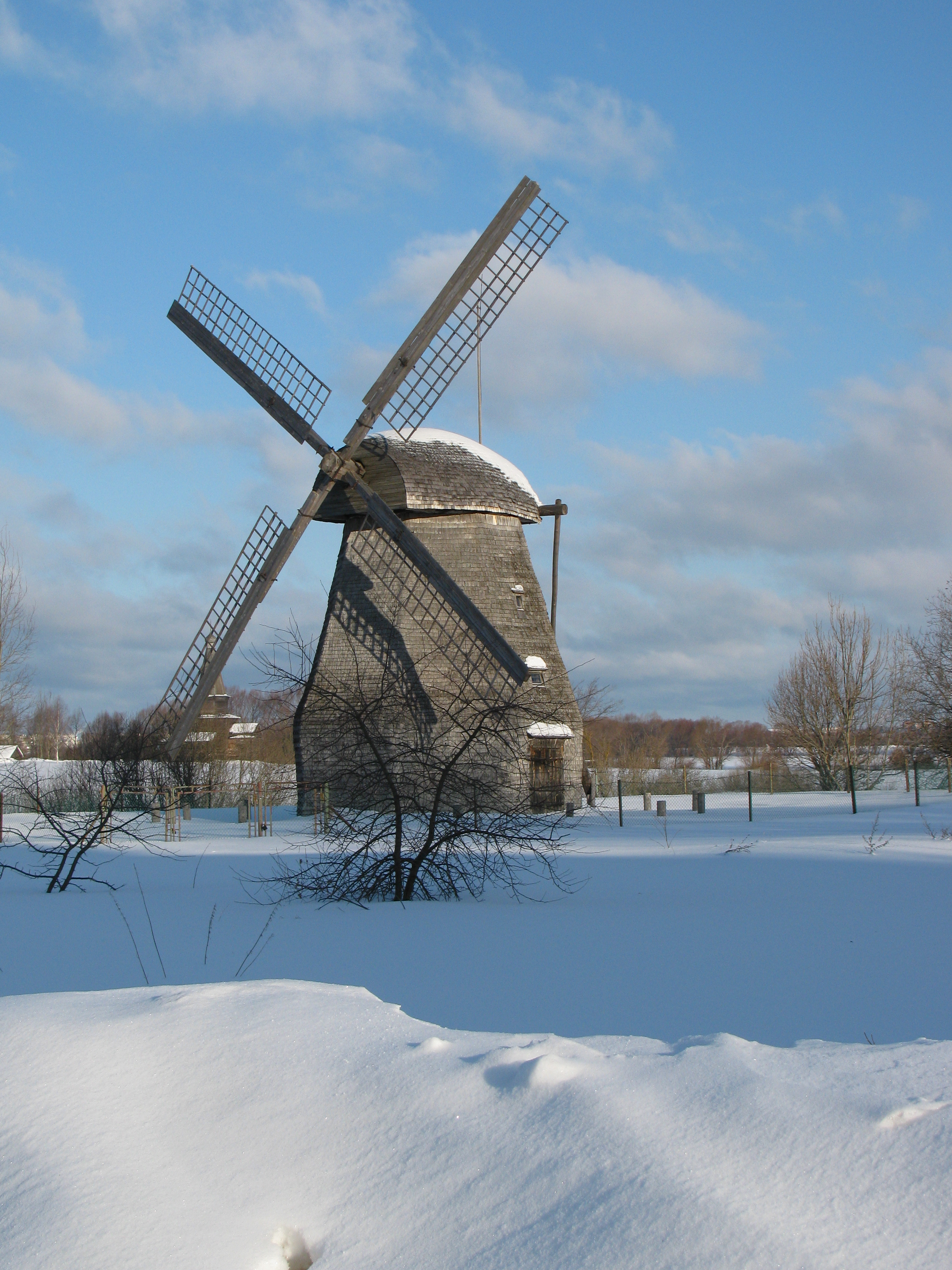 Мельница ветряная из д. Ладощины Солецкого района (Новгородская область, Великий Новгород, Витославлицы, стр. 19)